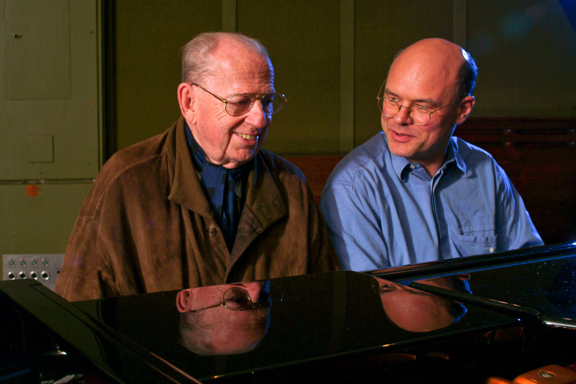 Christoph Spendel mit MPS Records Gründer Hans-Georg-Brunner-Schwer